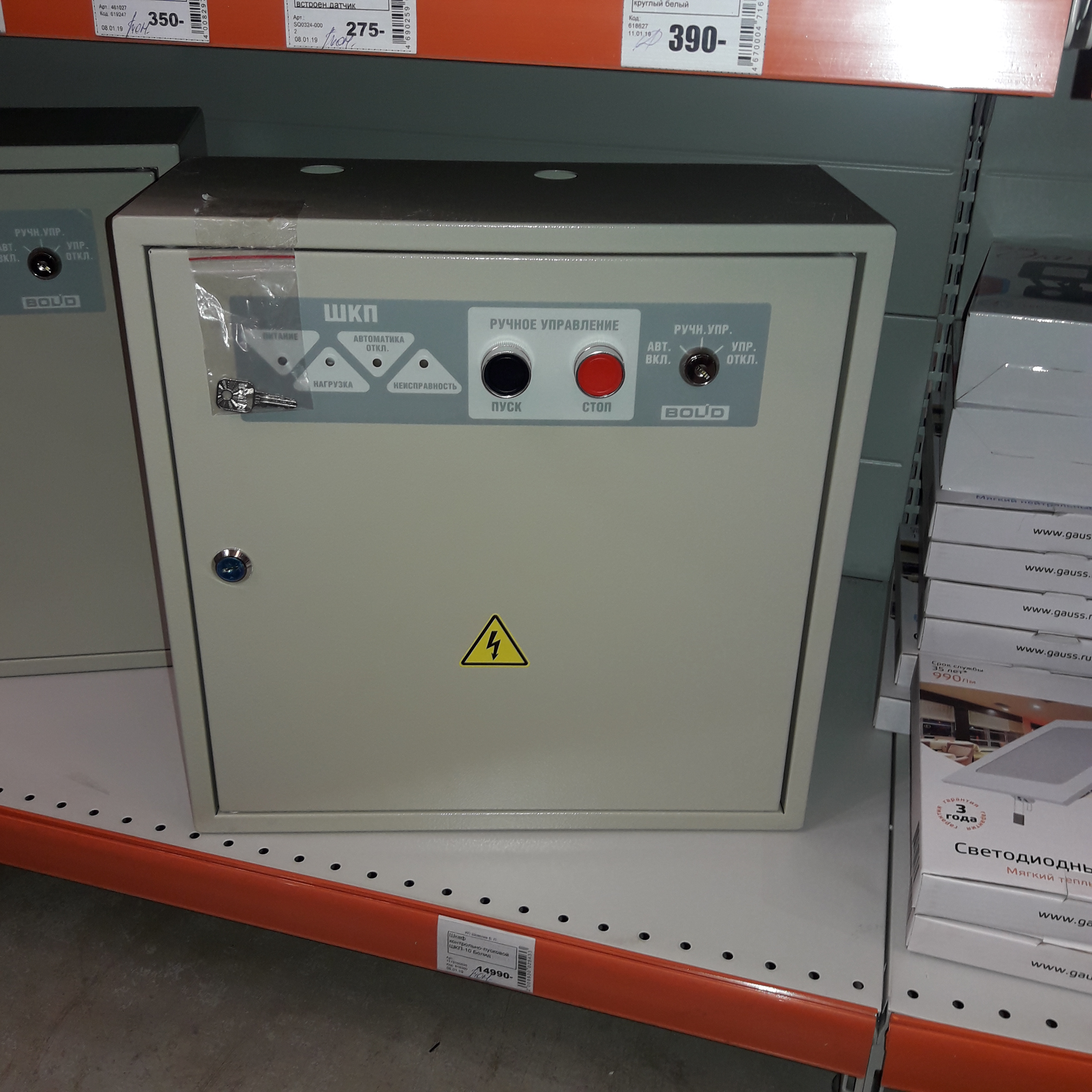 Шкафы контрольно-пусковые производства Болид в магазине